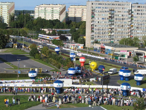 Olsztyn Osiedle Pojezierze - ulica Dworcowa podczas Tour de Pologne